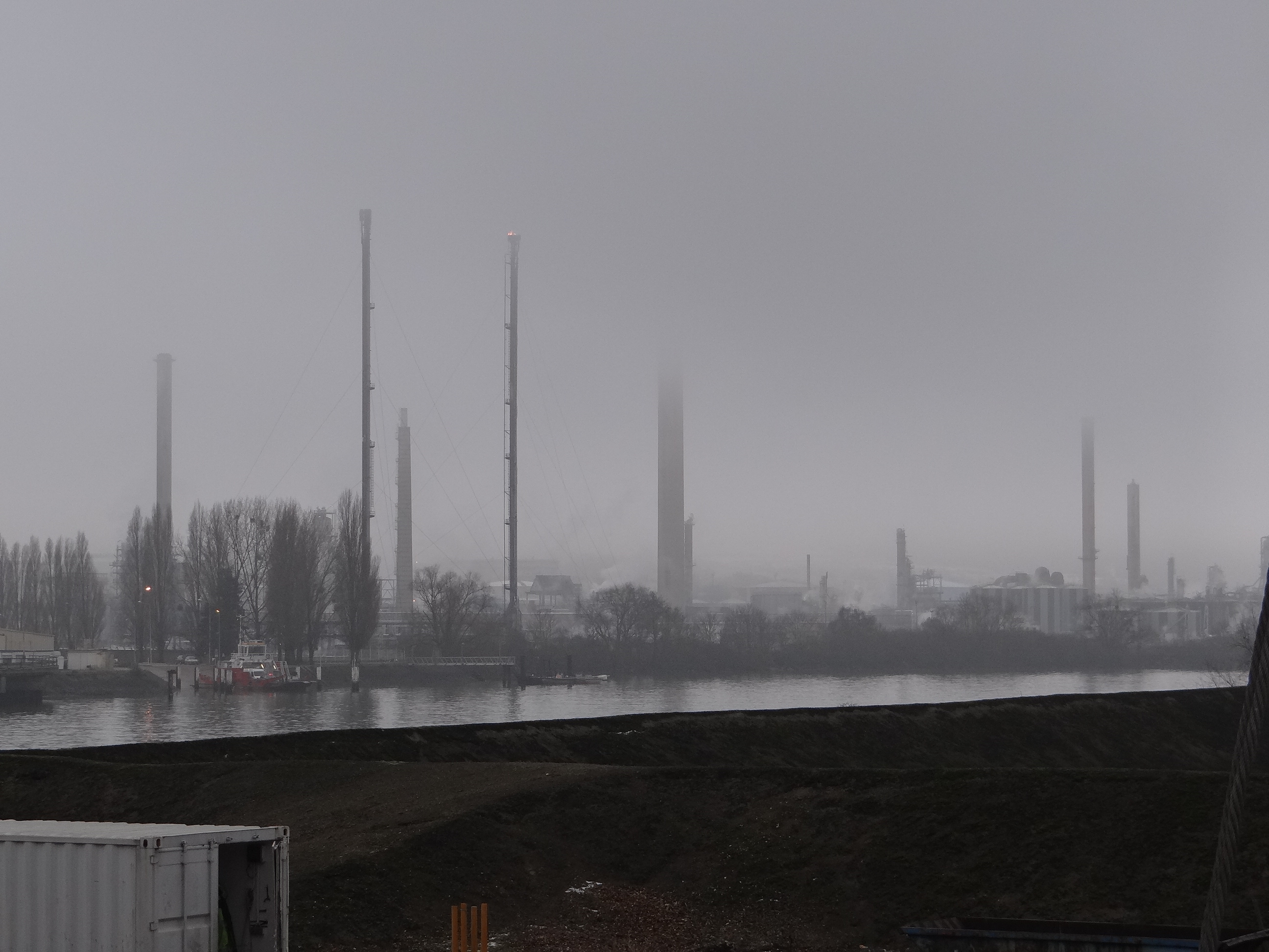 Photographie de la raffinerie de Petit-Couronne prise un matin de janvier 2013